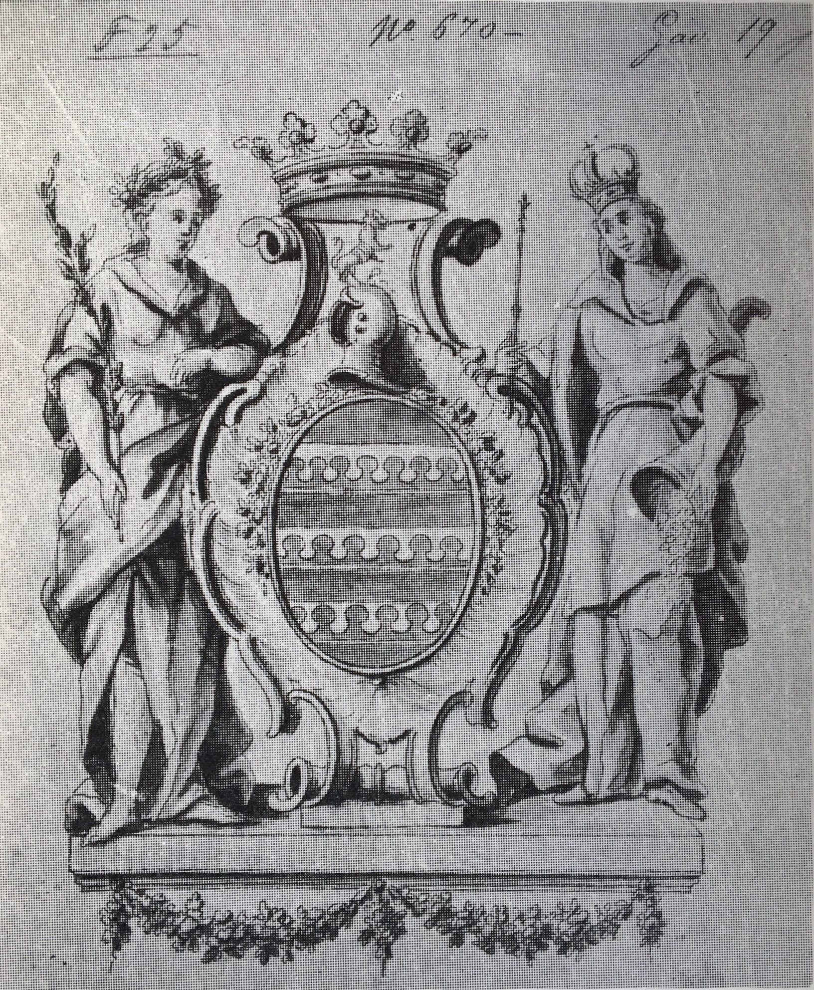 Portada rococó do manuscrito originalde Antônio Francisco Soares, apresentando as armas de Vasconcellos.